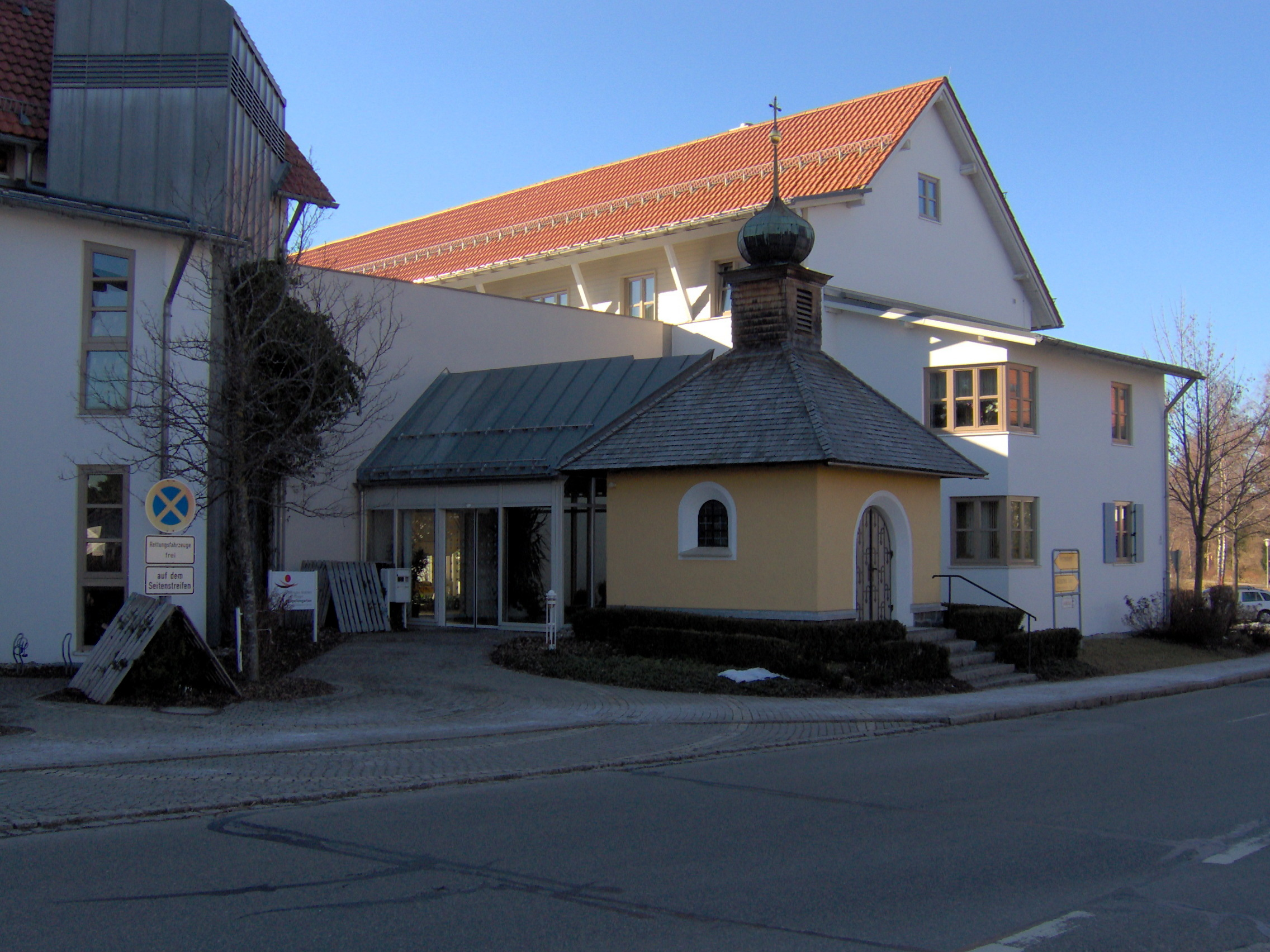 Dreifaltigkeitskapelle in der Rohrachstraße in Wiggensbach, Umbaut von der Seniorenwohnanlage Kapellengarten.